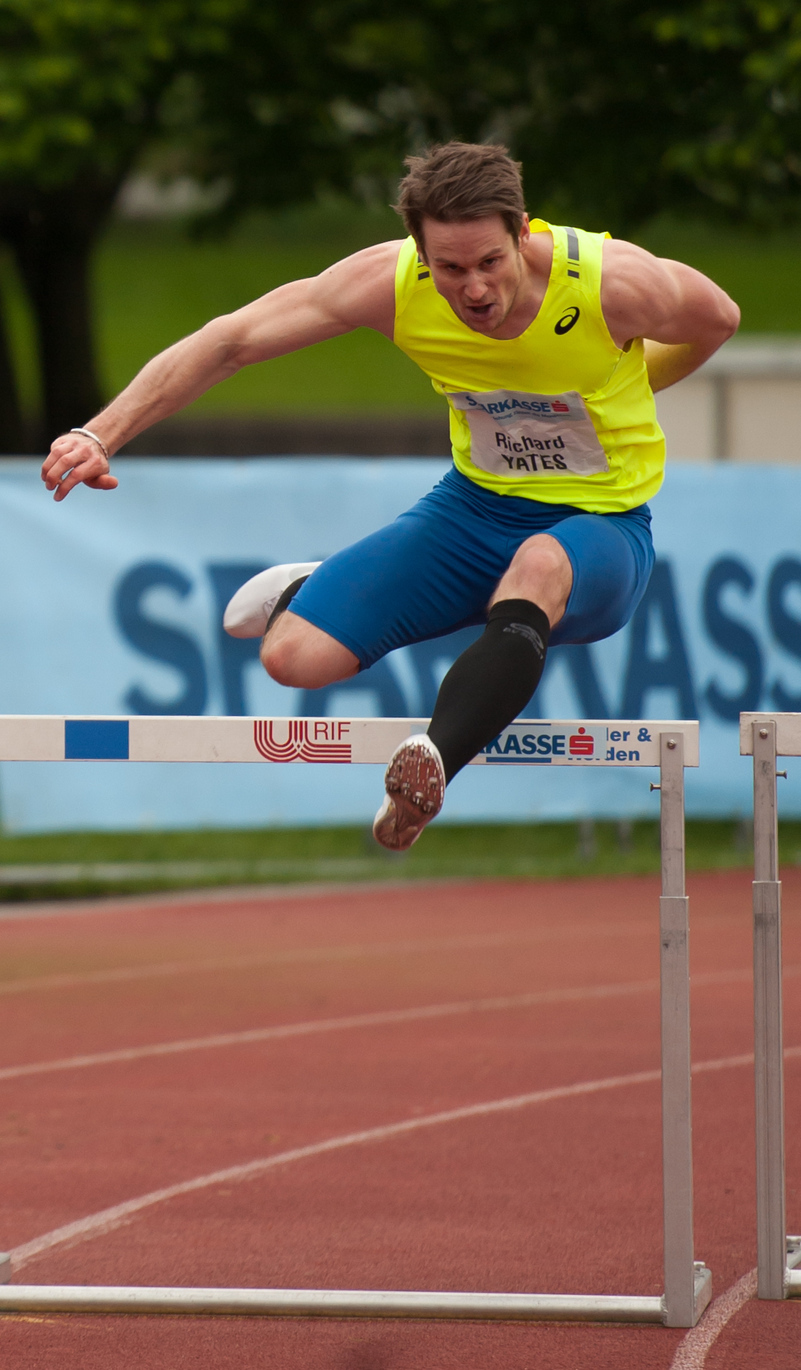 Salzburger Leichtathletik Gala am 27. Mai 2015: Richard Yates